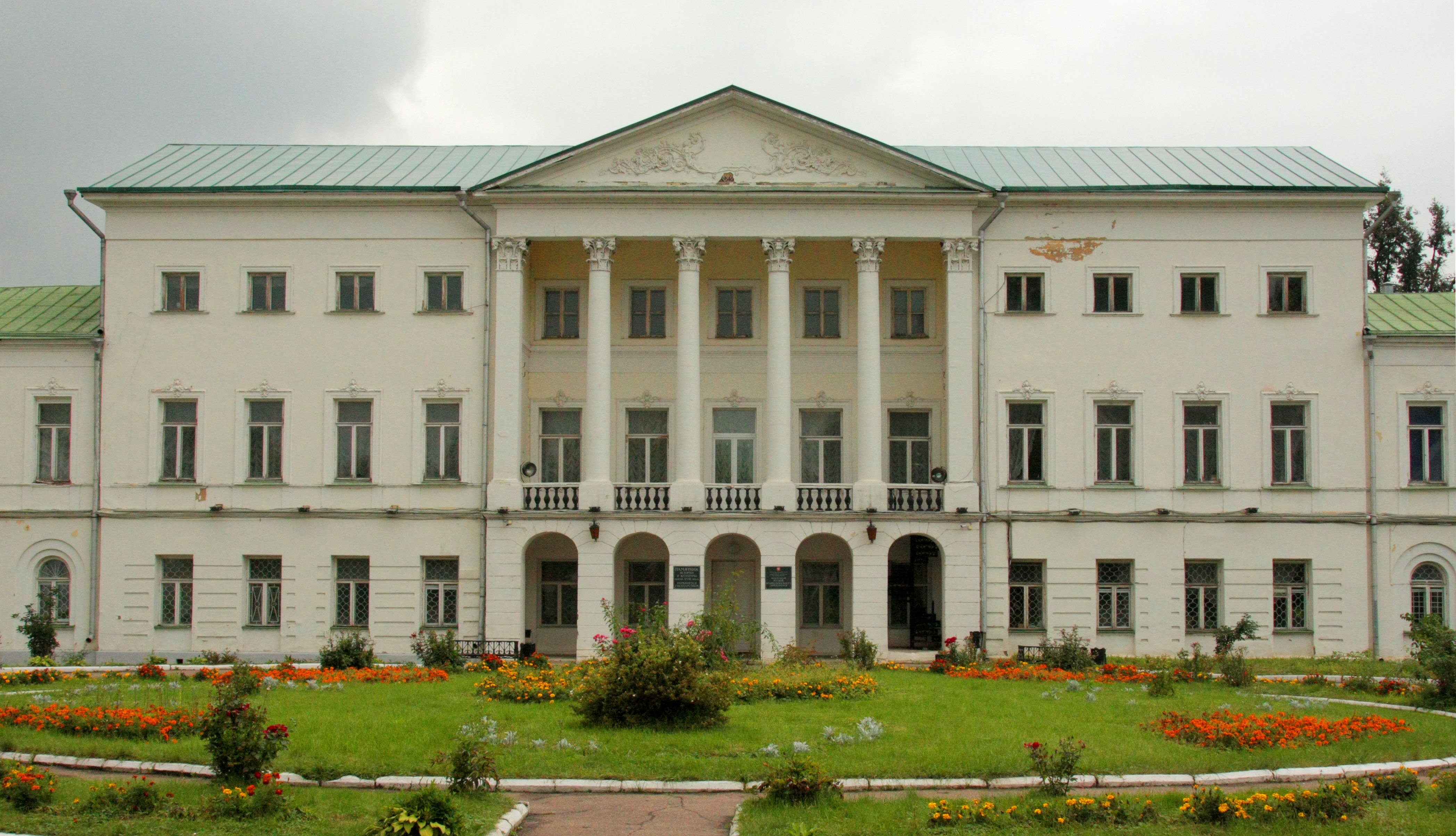 Усадьба «Ивановское» (Москва и Московская область, Подольск, посёлок Володарского (село Ивановское, Парковая улица, 1))